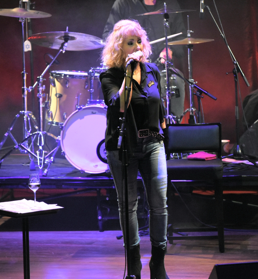 הופעה חיה זאפה הרצליה.